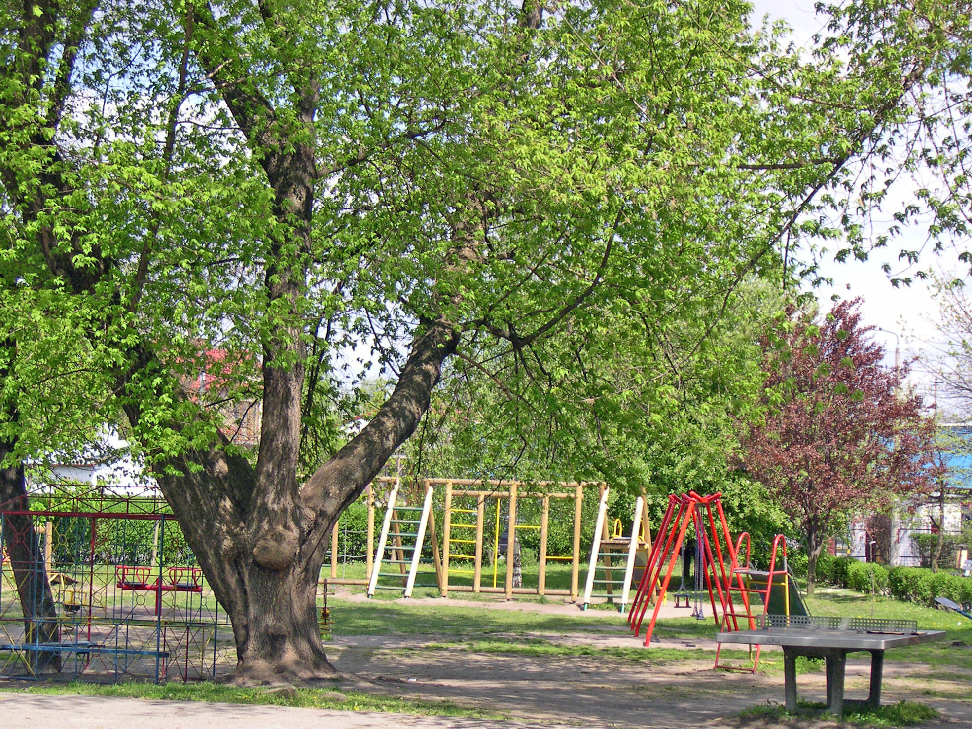 Park Jordanowski w Brzesku. W tle - nowy plac zabaw.